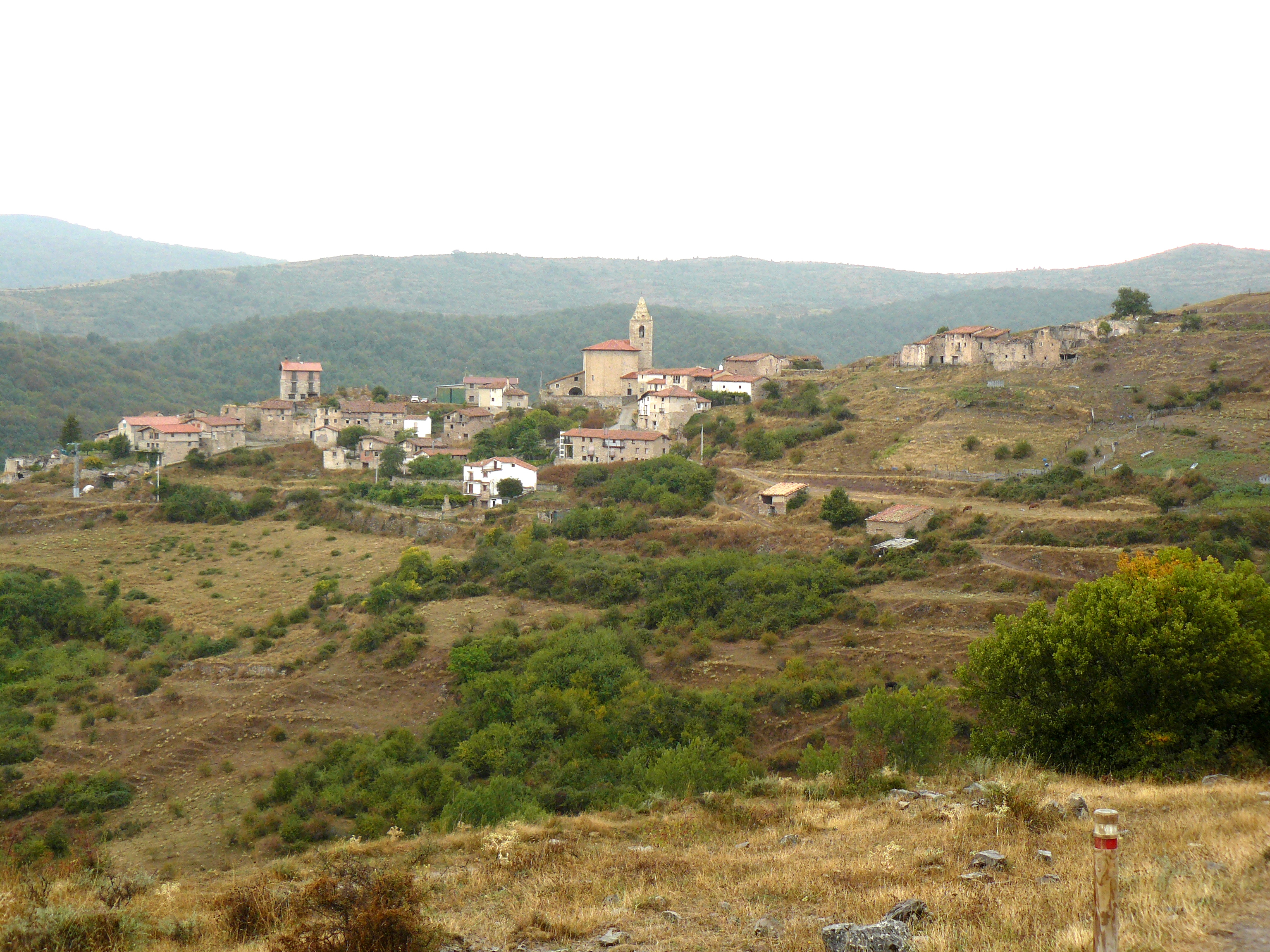 Torre en Cameros, La Rioja.